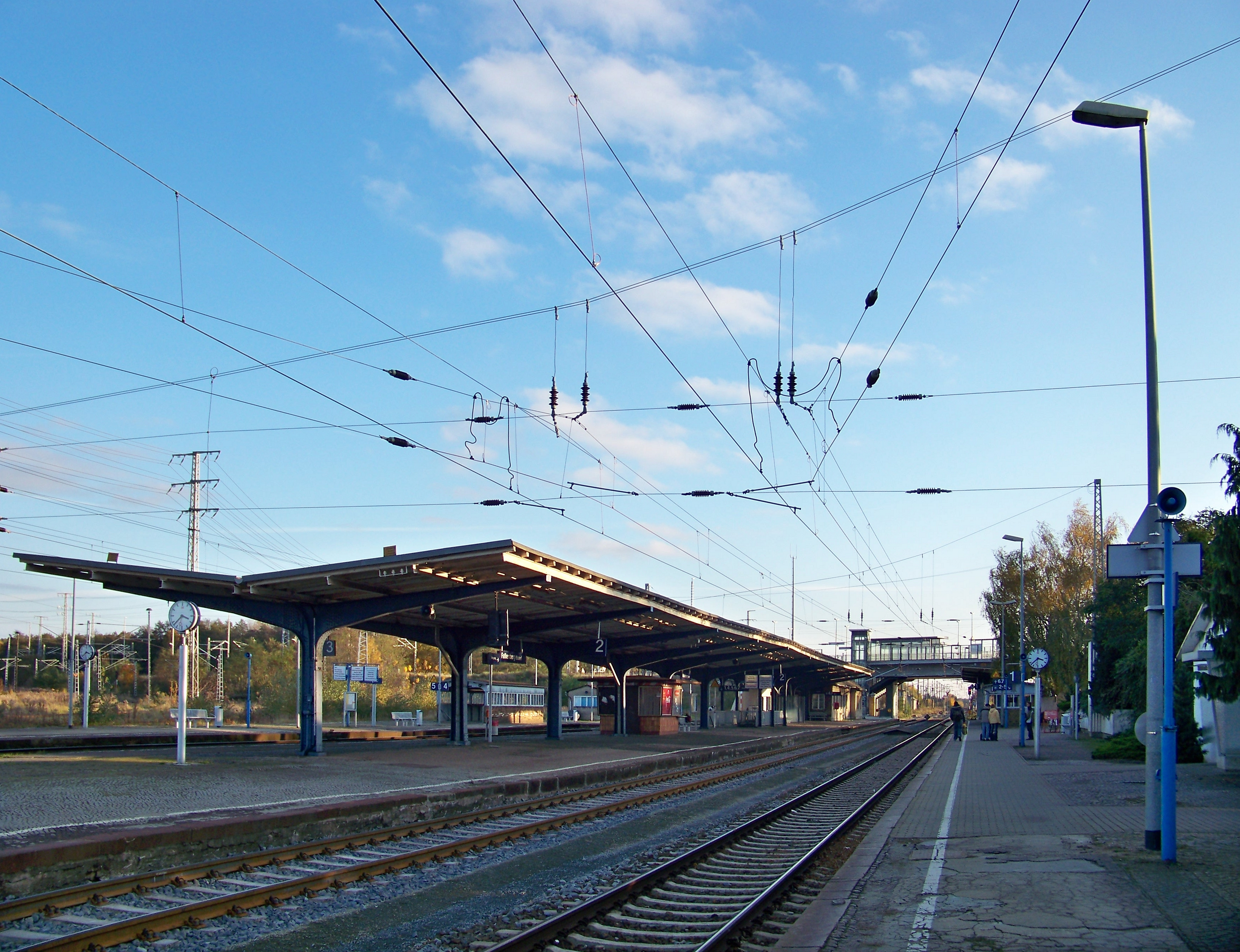 Bahnhof Falkenberg (Elster) tief